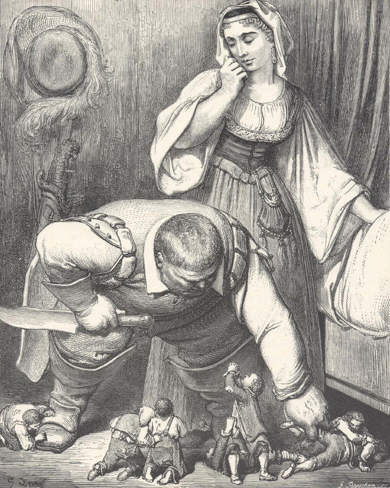 illustration